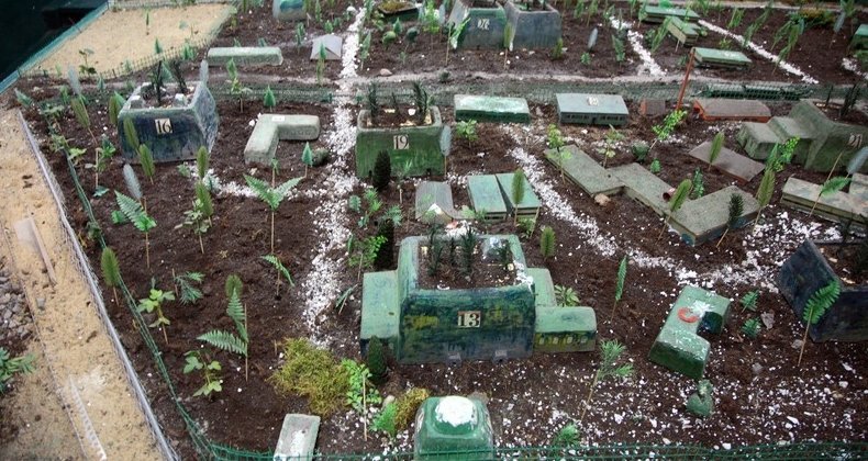 Gierłoż, woj. warmińsko-mazurskie, powiat kętrzyński, gmina Kętrzyn - Wilczy Szaniec